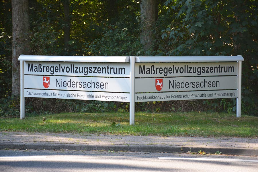 Maßregelvollzugszentrum